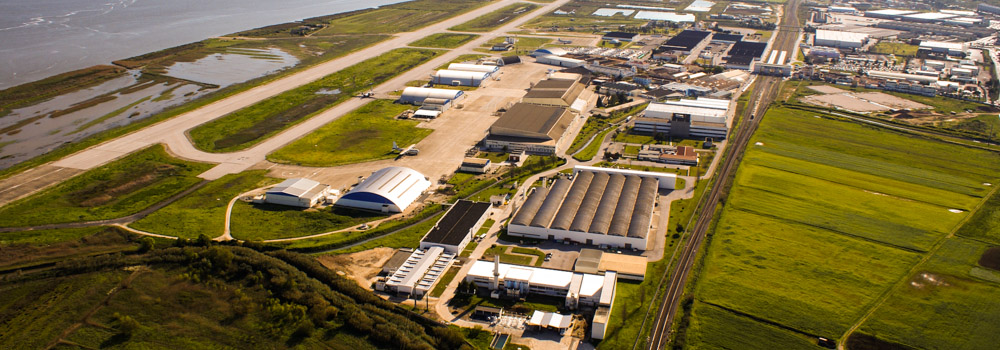 Vista aérea das instalações da OGMA - Indústria Aeronáutica de Portugal